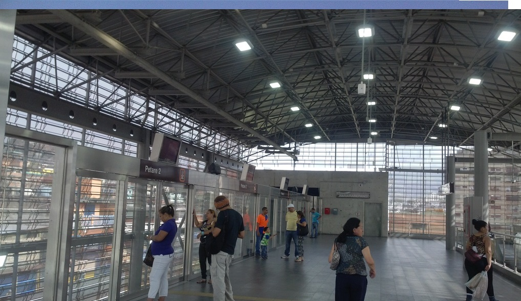 Cabletren de Petare Estación Petare II Municipio Sucre Caracas